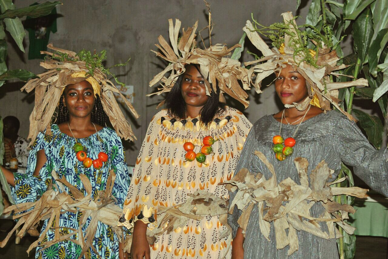 Princesses du peuple Sawa lors de ma célébration du culte de l'eau par ledit peuple . This is an image from Cameroon